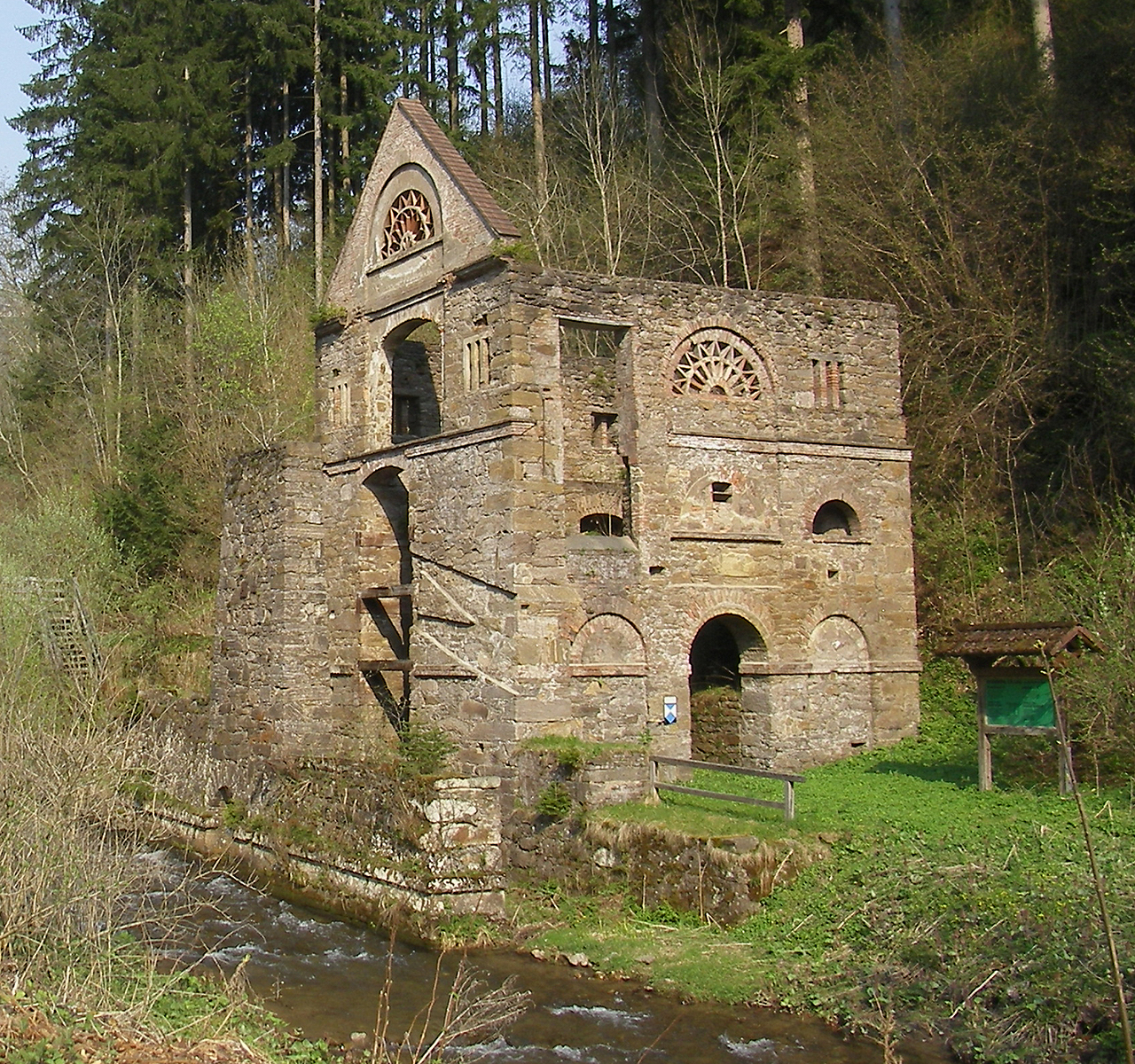 Historische Erzquetsche aus dem 19. Jahrhundert in Lölling (Kärnten) – Die Erzquetsche stammt aus dem 19. Jahrhundert und wurde zur Zerkleinerung von Eisenerz vor der Verhüttung im Hochofen verwendet